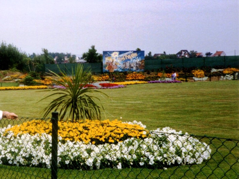 BellewaerdeLospiratasconstruction